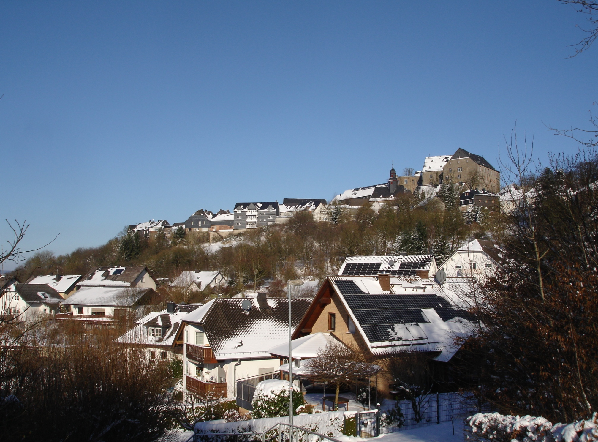 Burg Hohensolms mit dem historischen Ortskern auf dem Ramsberg